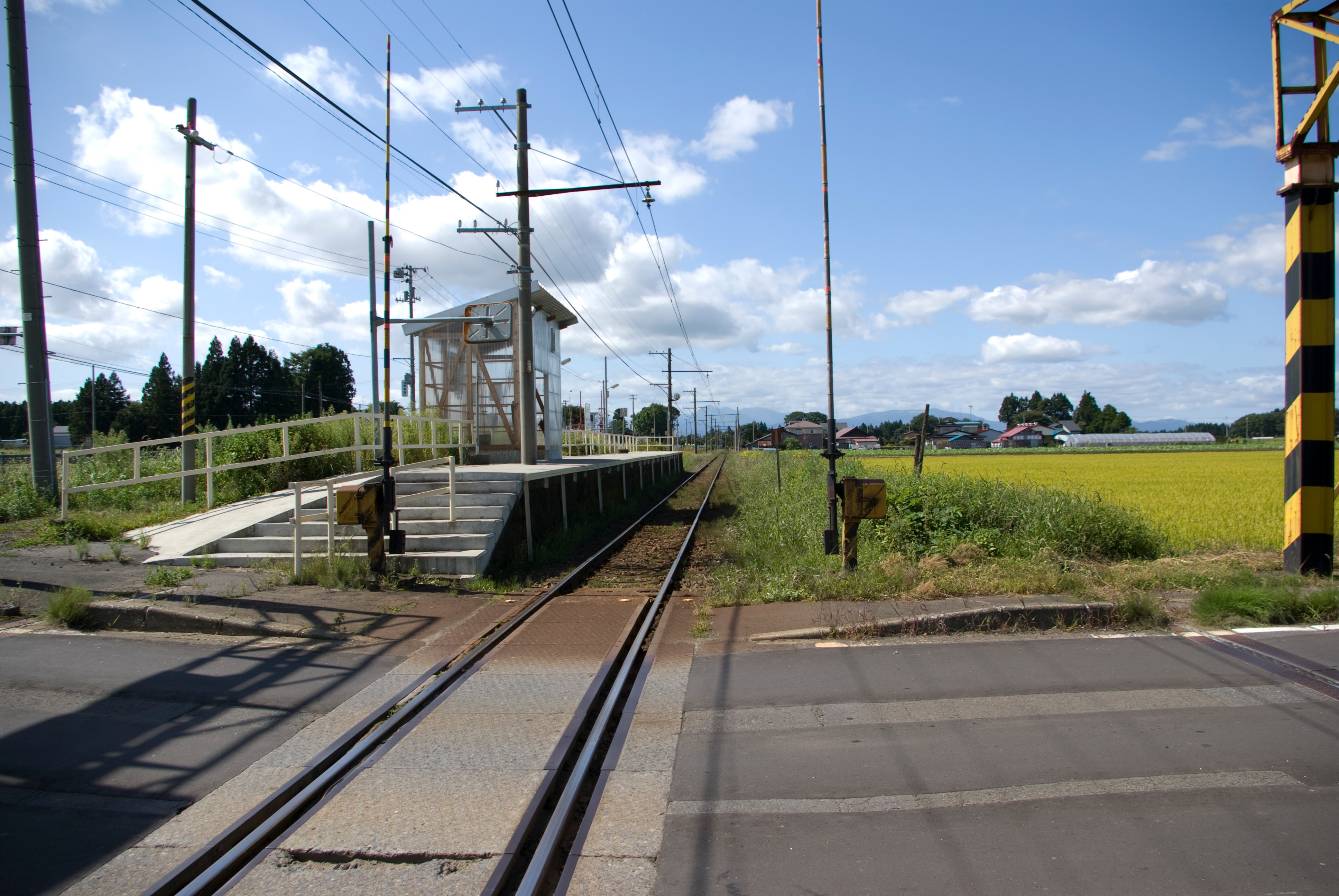 十和田観光電鉄柳沢駅